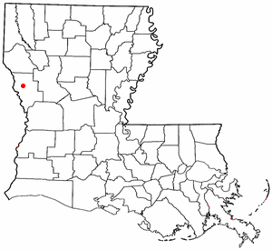 Volapük: Topam in tat: Louisiana.